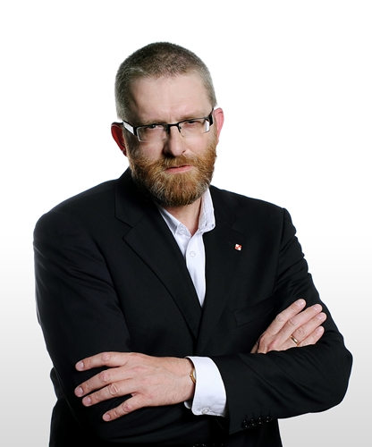 Grzegorz Braun 2018, foto oficjalne: Klucz Pobudki Jastrzębie Zdrój